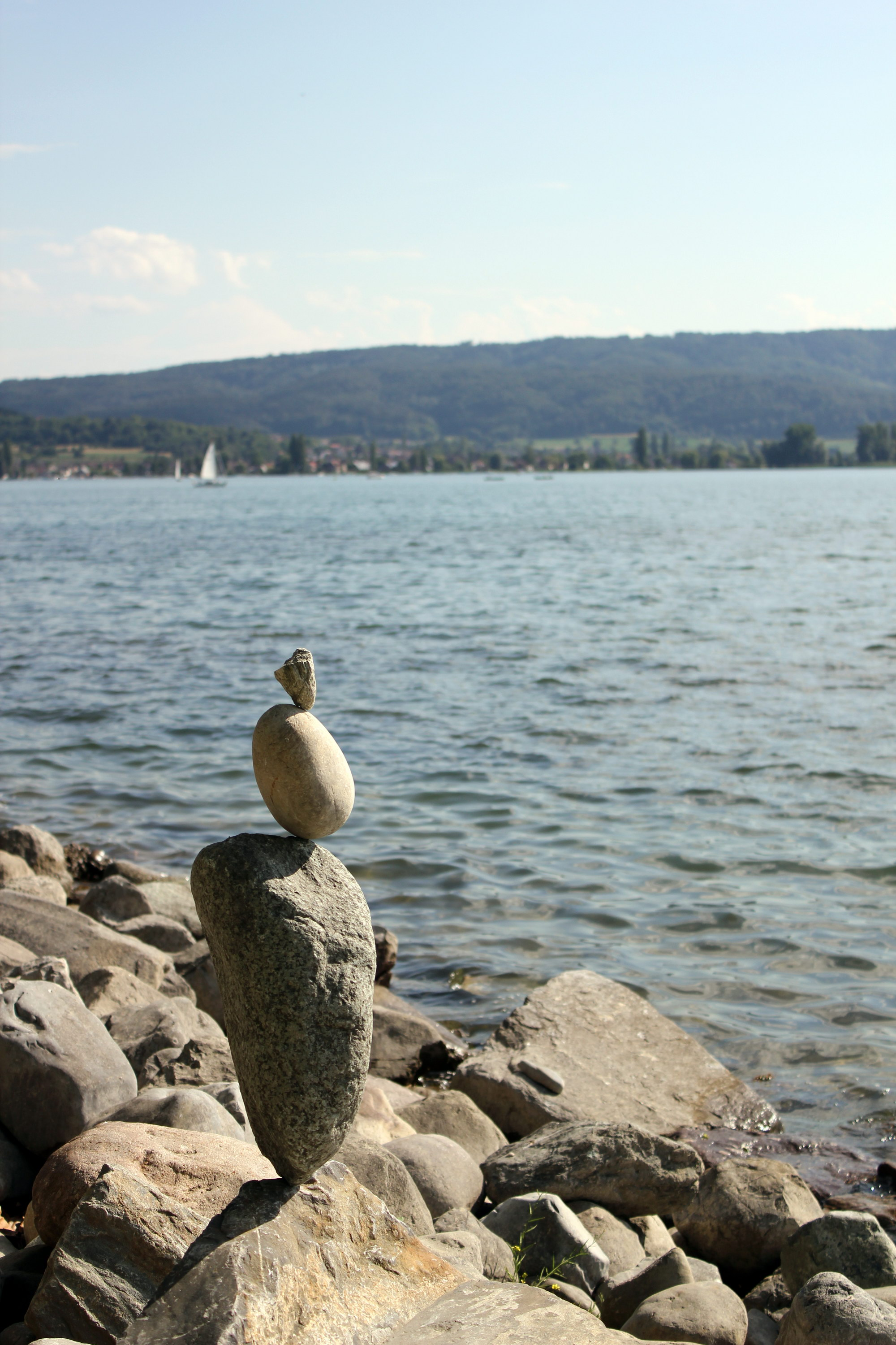 Steinkunst von Josef „Sepp“ Bögle, Radolfzell, Juni 2011